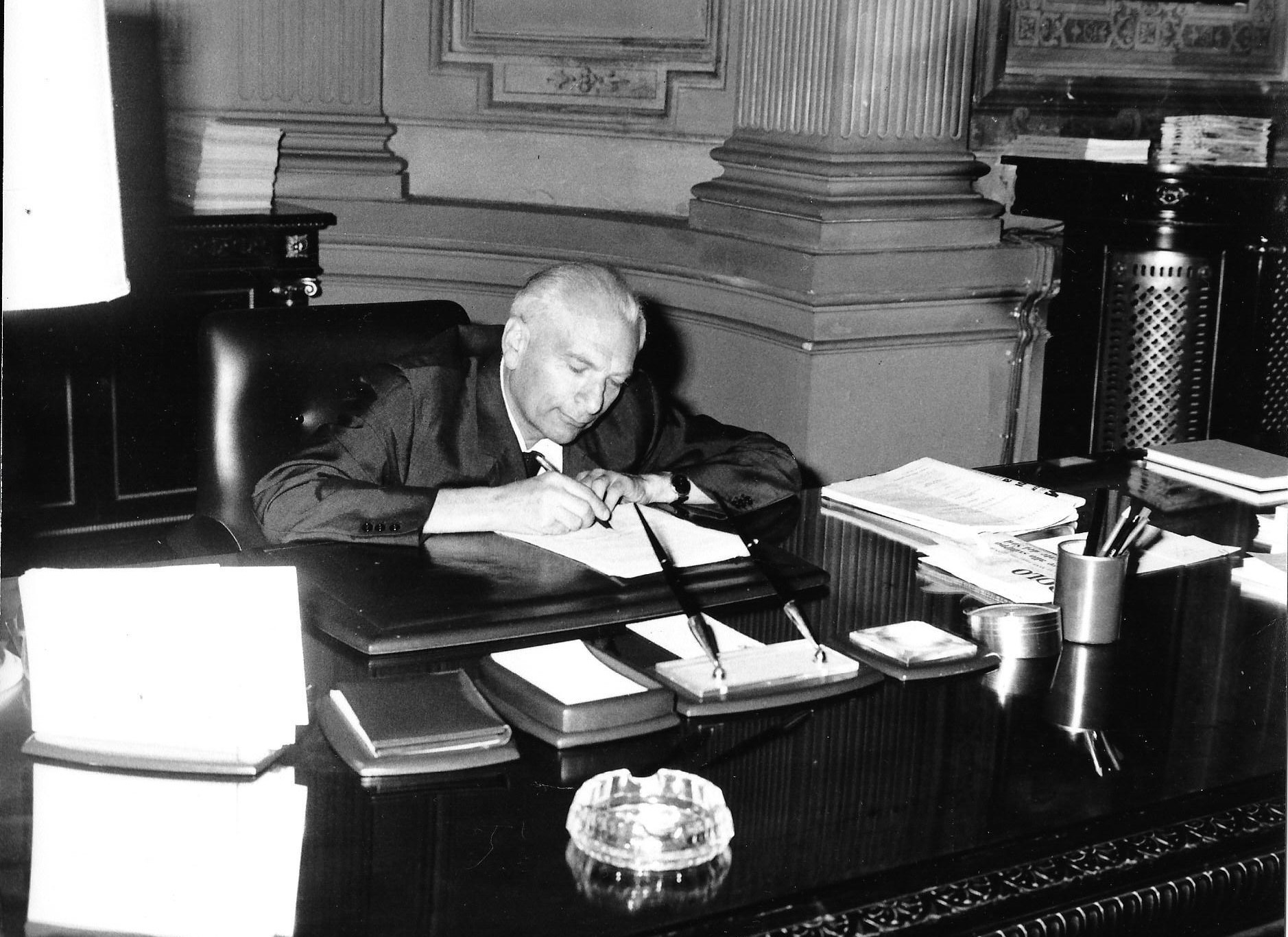 Senatore, insegnante e politico italiano (1909-2000) autore sconosciuto